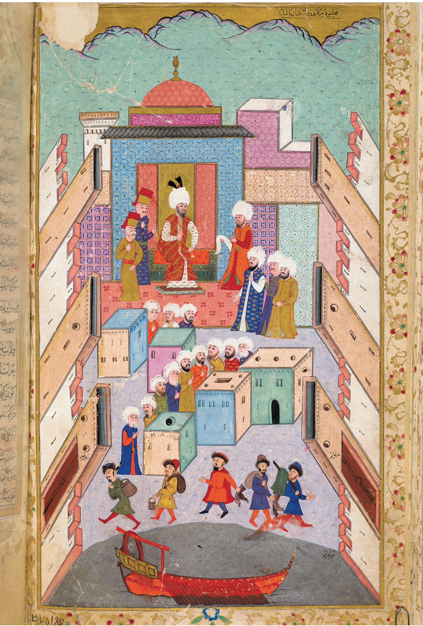 Osman Paşa’nın Demirkap’da Devlet Erkanı İle Yaptığı Toplantı, Mustafa Âli, Nusretname